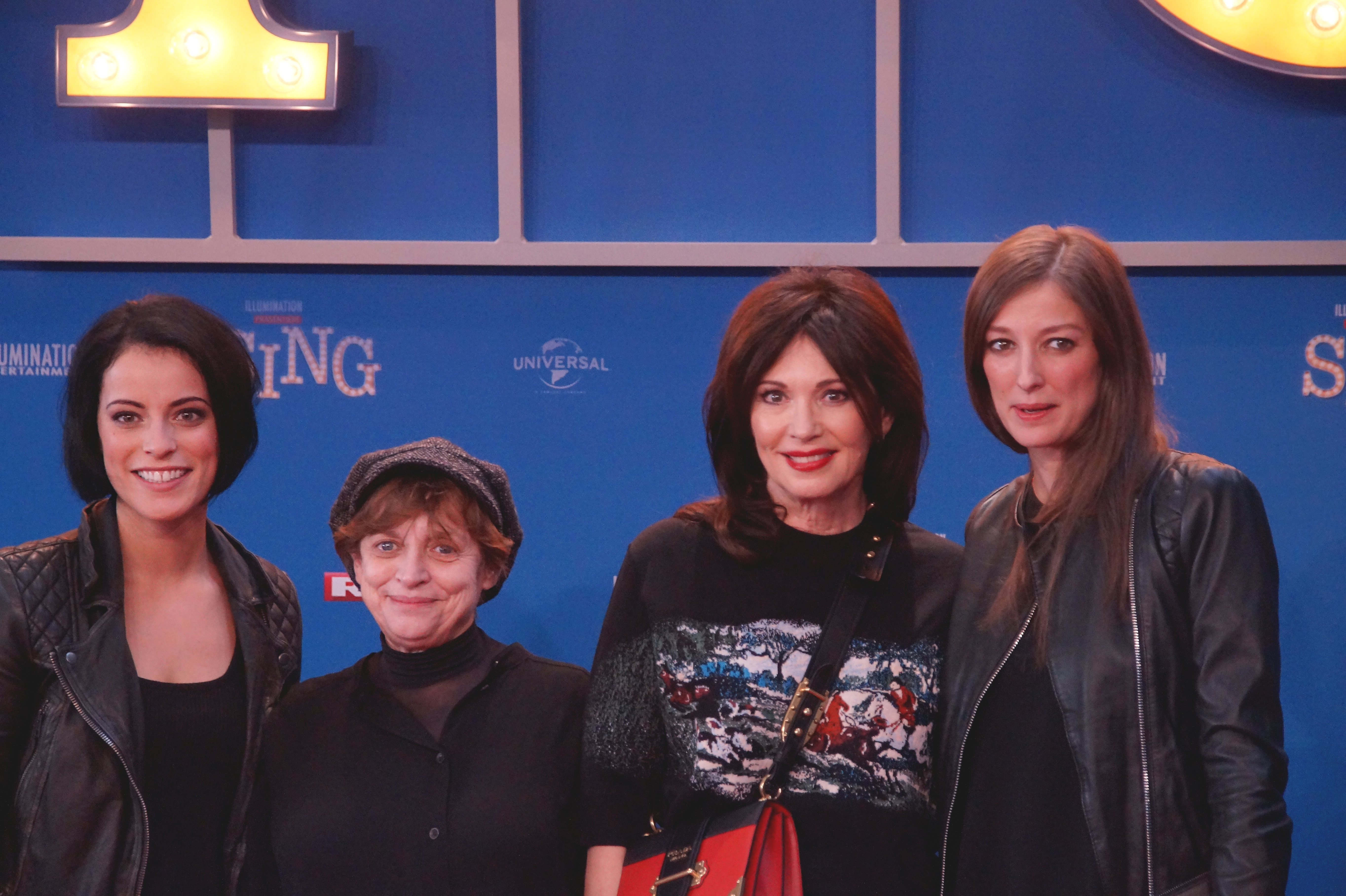 Stefanie Kloß, Katharina Thalbach, Iris Berben and Alexandra Maria Lara bei der Europa-Premiere von dem neuen Animationsfilm "SING", am 27.11.2016 im Kölner Cinedom.